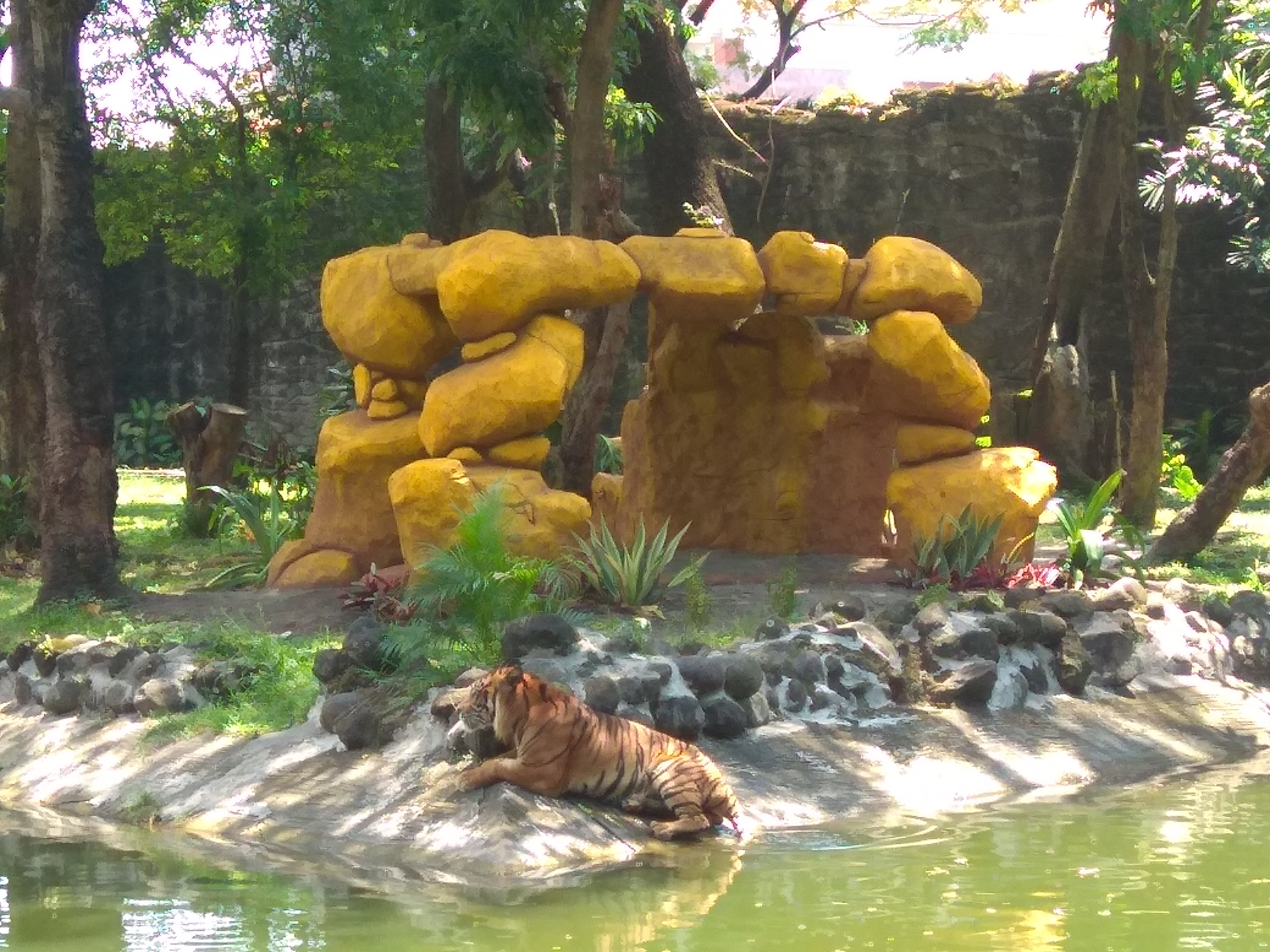 Aktivitas Si wira Sumatran Tiger saat berada di exhibit harimau